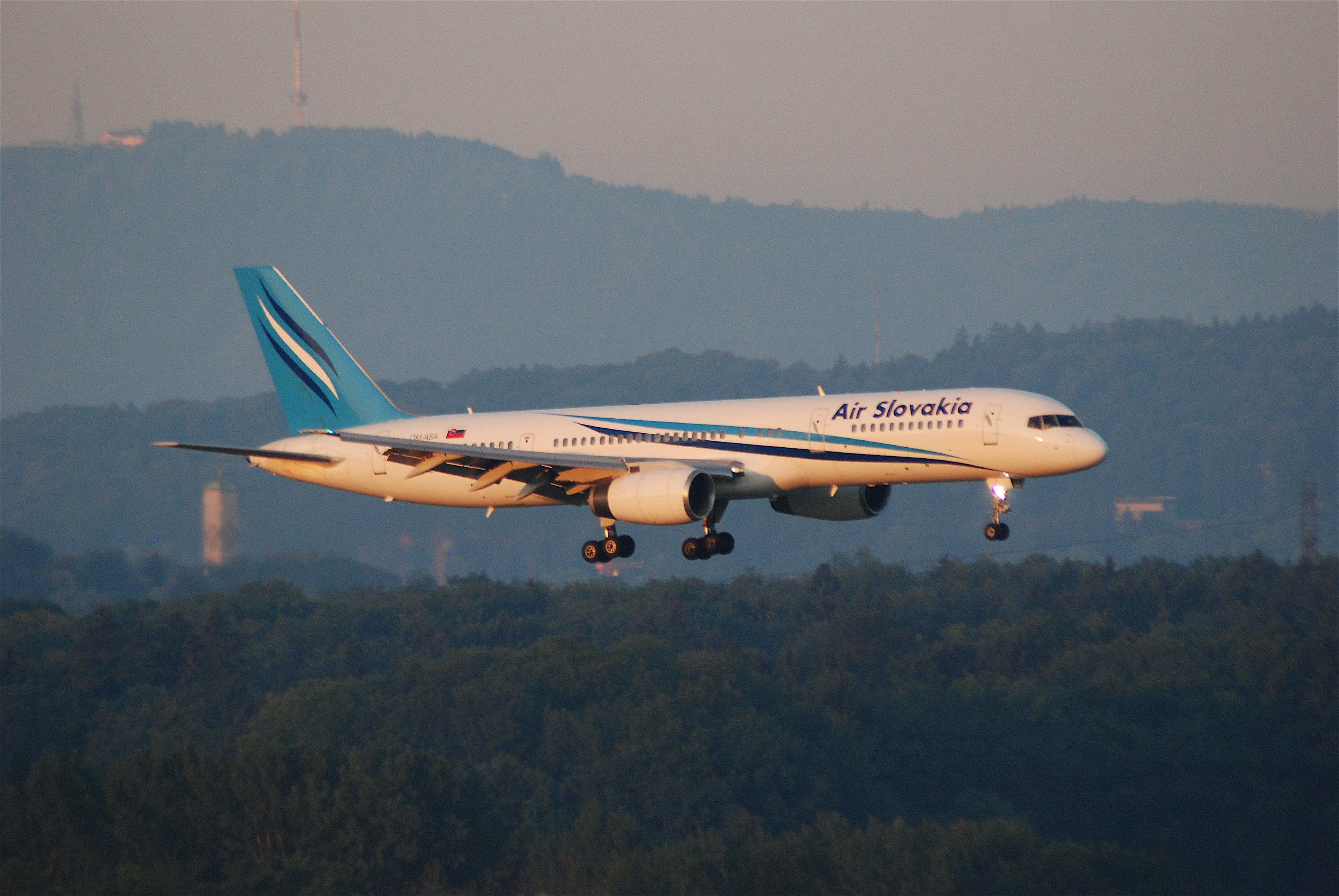 Air Slovakia Boeing 757-236; OM-ASA@ZRH;05.08.2007/485ch